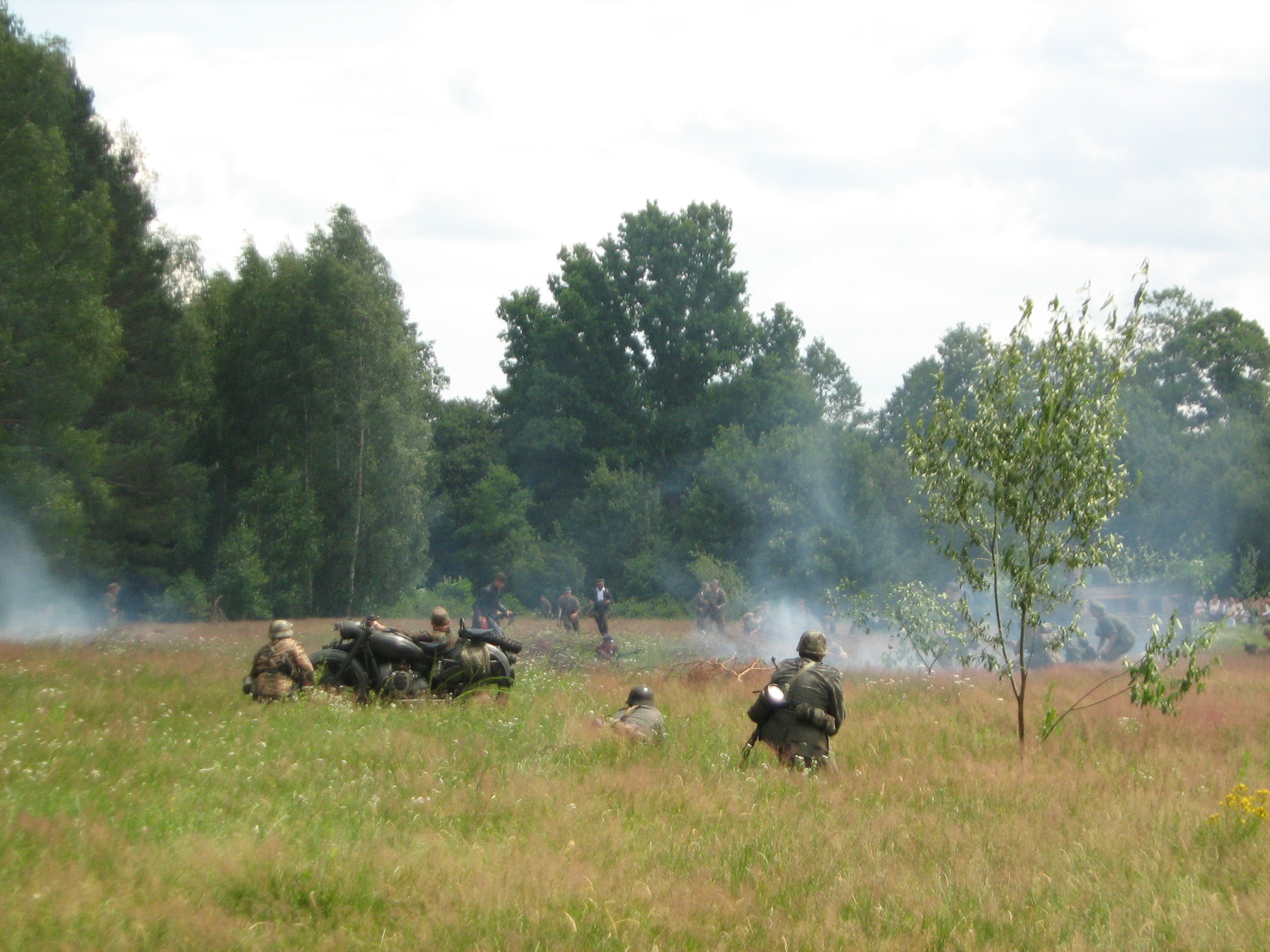 Rekonstrukcja historyczna Bitwy pod Osuchami w jej 63 rocznicę